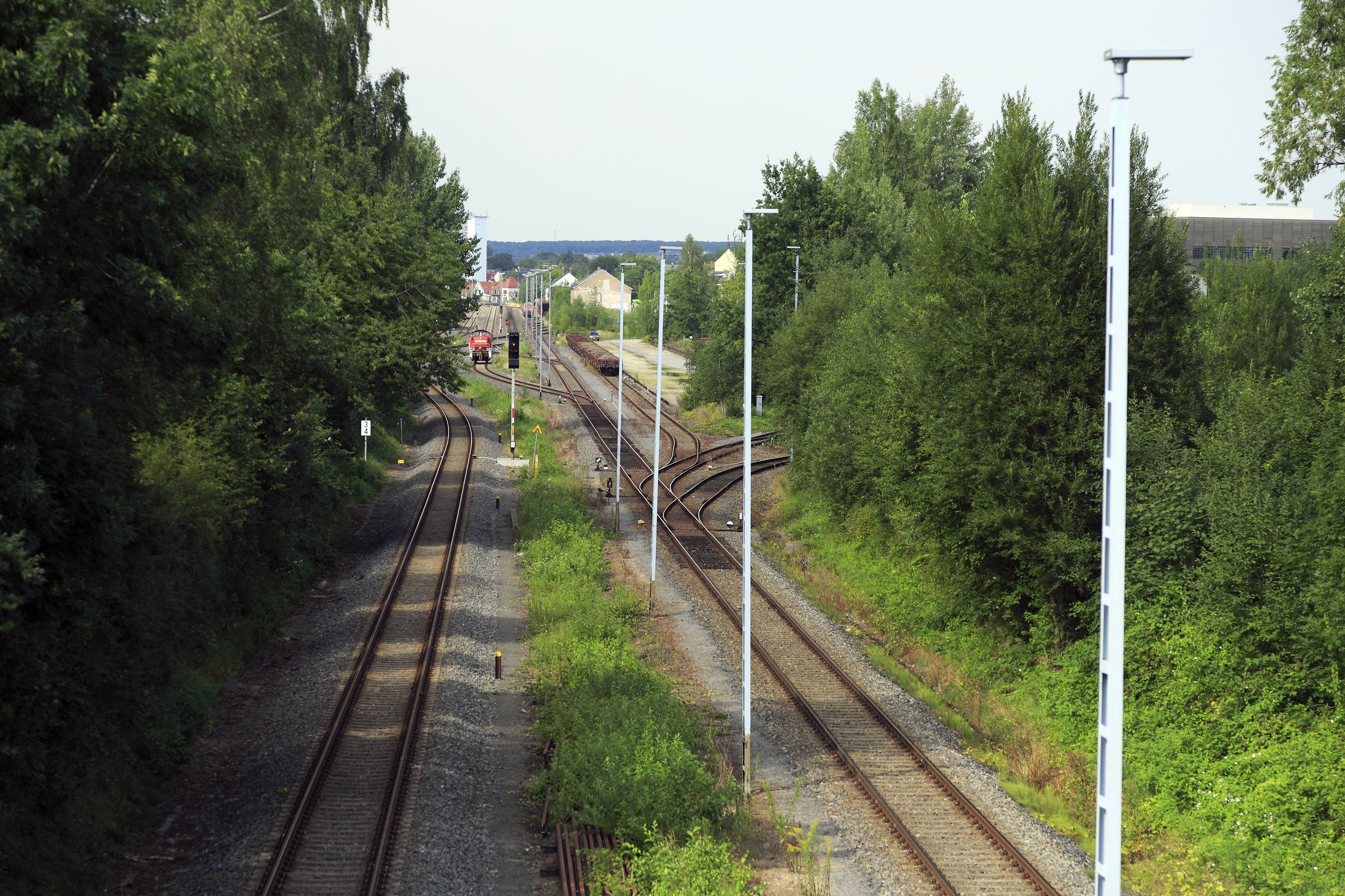 Richtung Chemnitz Hbf, das Einfahrsignal von Chemnitz Süd ist weit in Richtung Norden versetzt worden, die Gleise rechts sind die Anbindung des »Railport Chemnitz«. Vor den Handweichen im Auszieh- und Anschlussgleis rechts soll die Einbindung vom Straßenbahnnetz zum Technopark liegen. Bis Reichenhain soll die Strecke wieder zweigleisig ausgebaut werden.